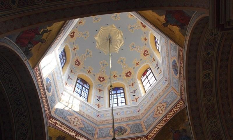 Warszawa (Polska)